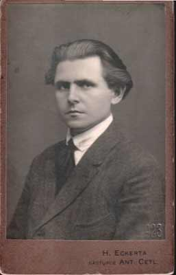 Тамаш Грыб (1895-1938 гг.) - беларускі грамадска-палітычны і культурны дзеяч. г. Прага. 1923 г.